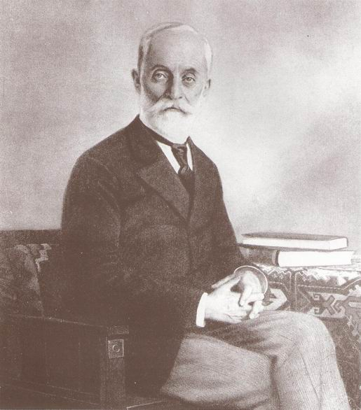 Алекса Спасић, први гувернер Народне банке Србије